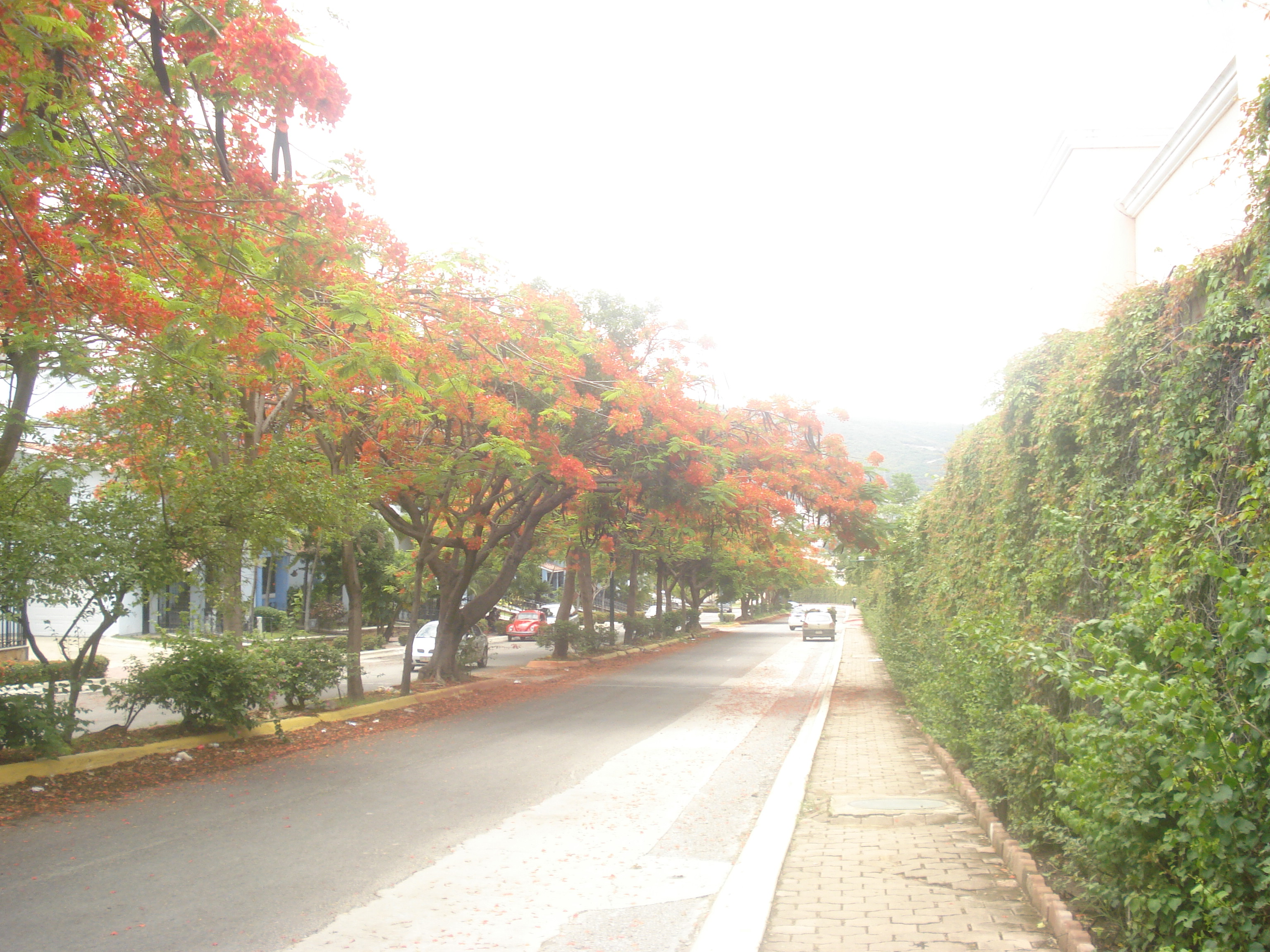 Flamboyanes cerca del Libramiento Sur, Tuxtla, México.